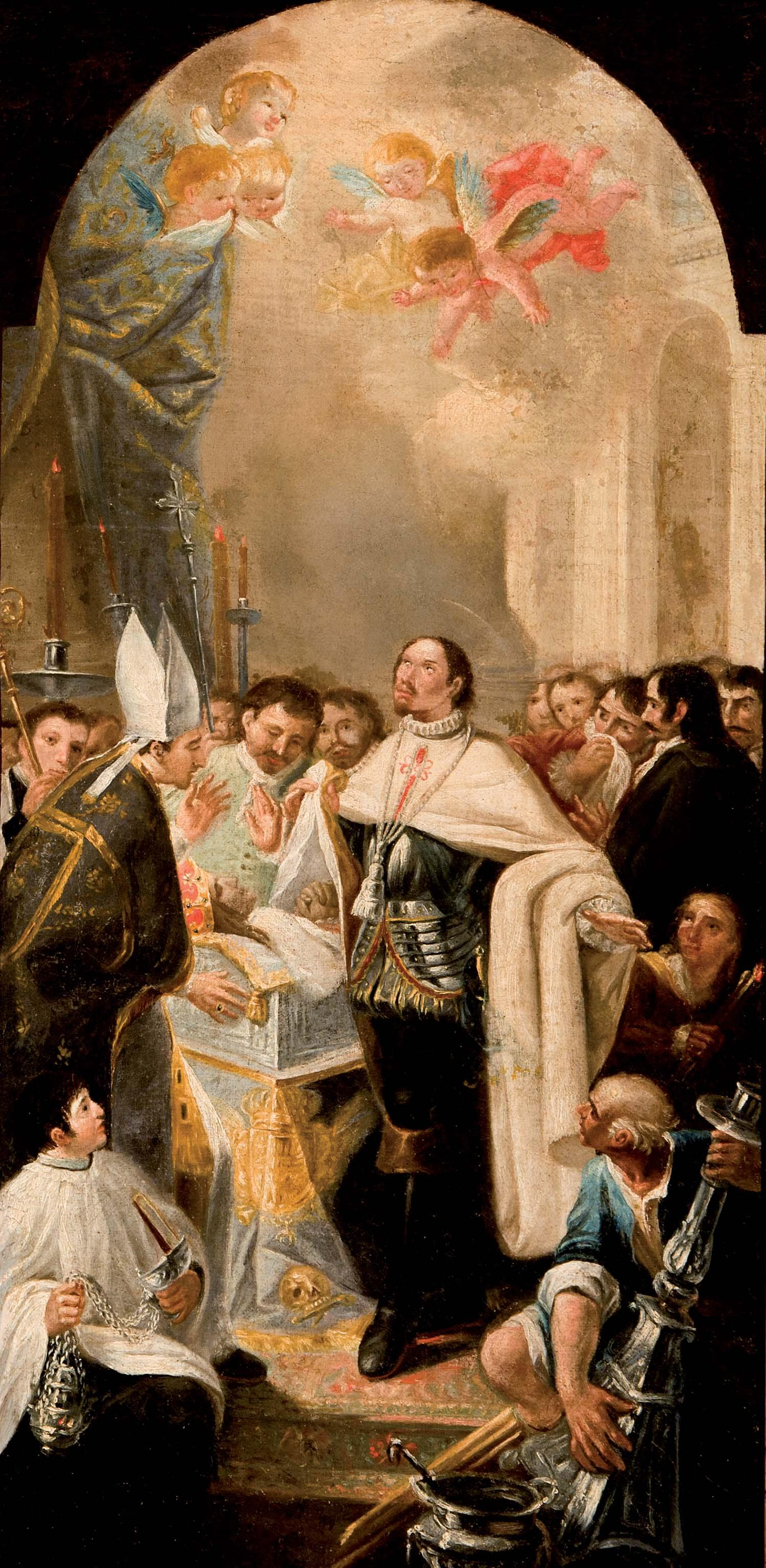 San Francisco de Borja ante el cadaver de la emperatriz Isabel oil on canvas 63.00 x 32.00 cm May 27, 2013 / Madrid Arte y Libros